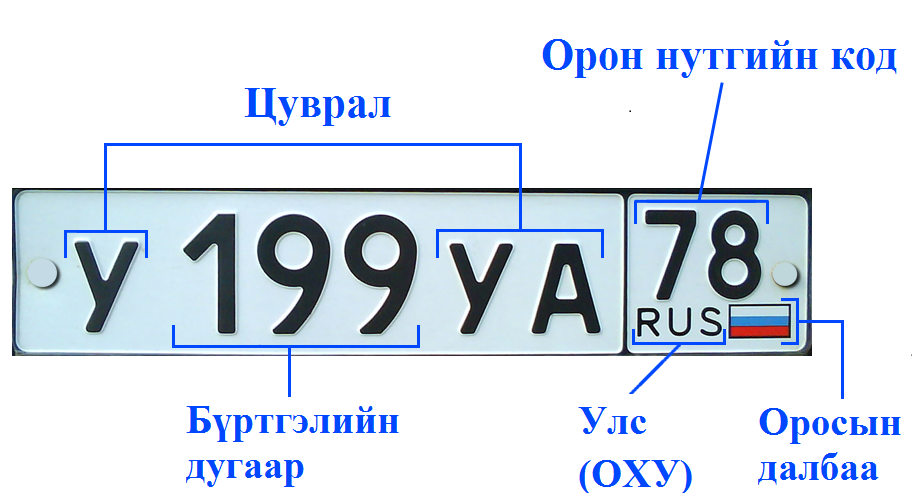 Монгол: Оросын тээврийн хэрэгслийн улсын дугаар